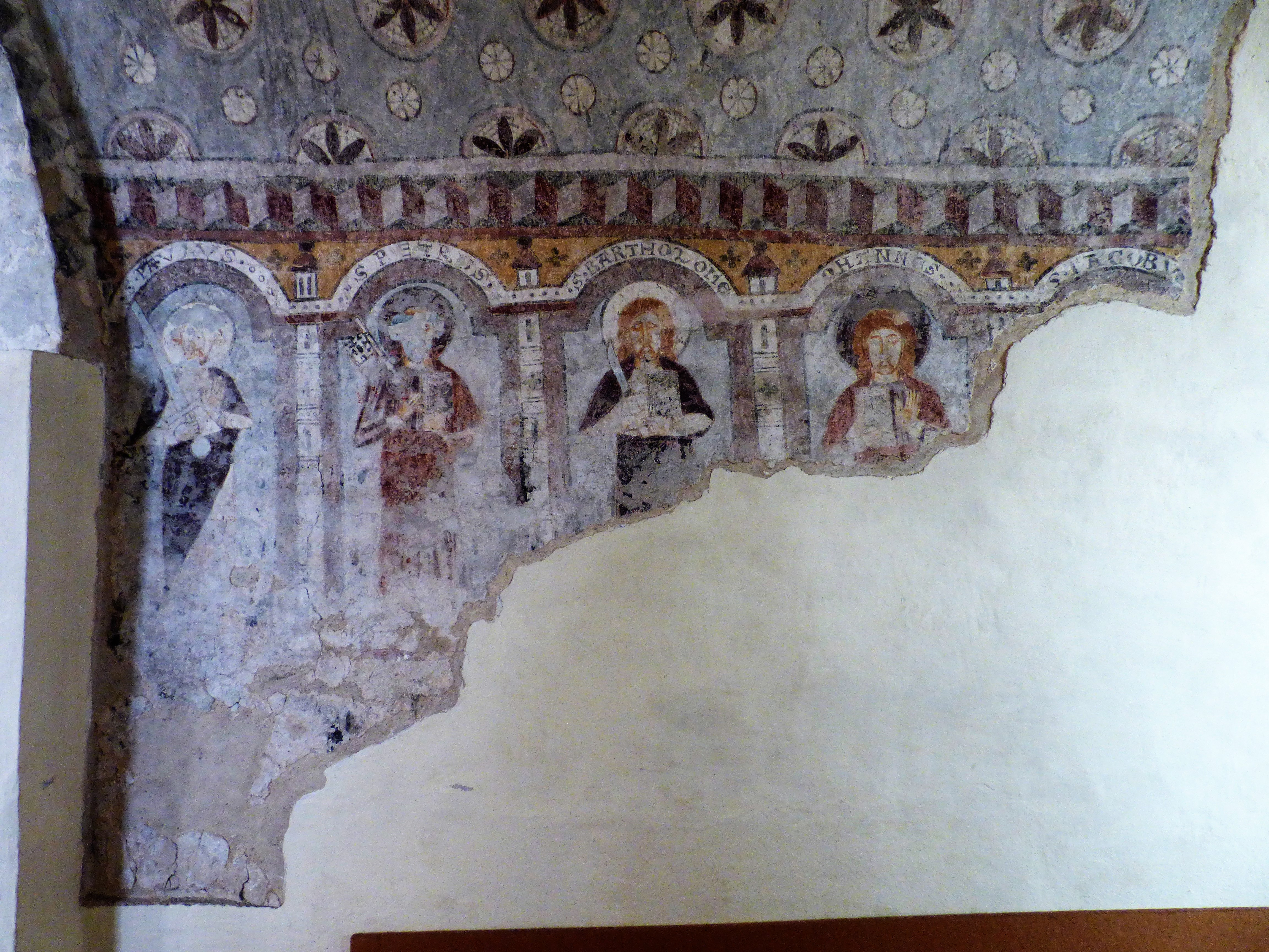 Kirche St. Ulrich (Gemeinde Feldkirchen, Kärnten): Fresken im Chorturm: Apostel Petrus, Paulus, Bartholomäus, Johannes, Jakobus.